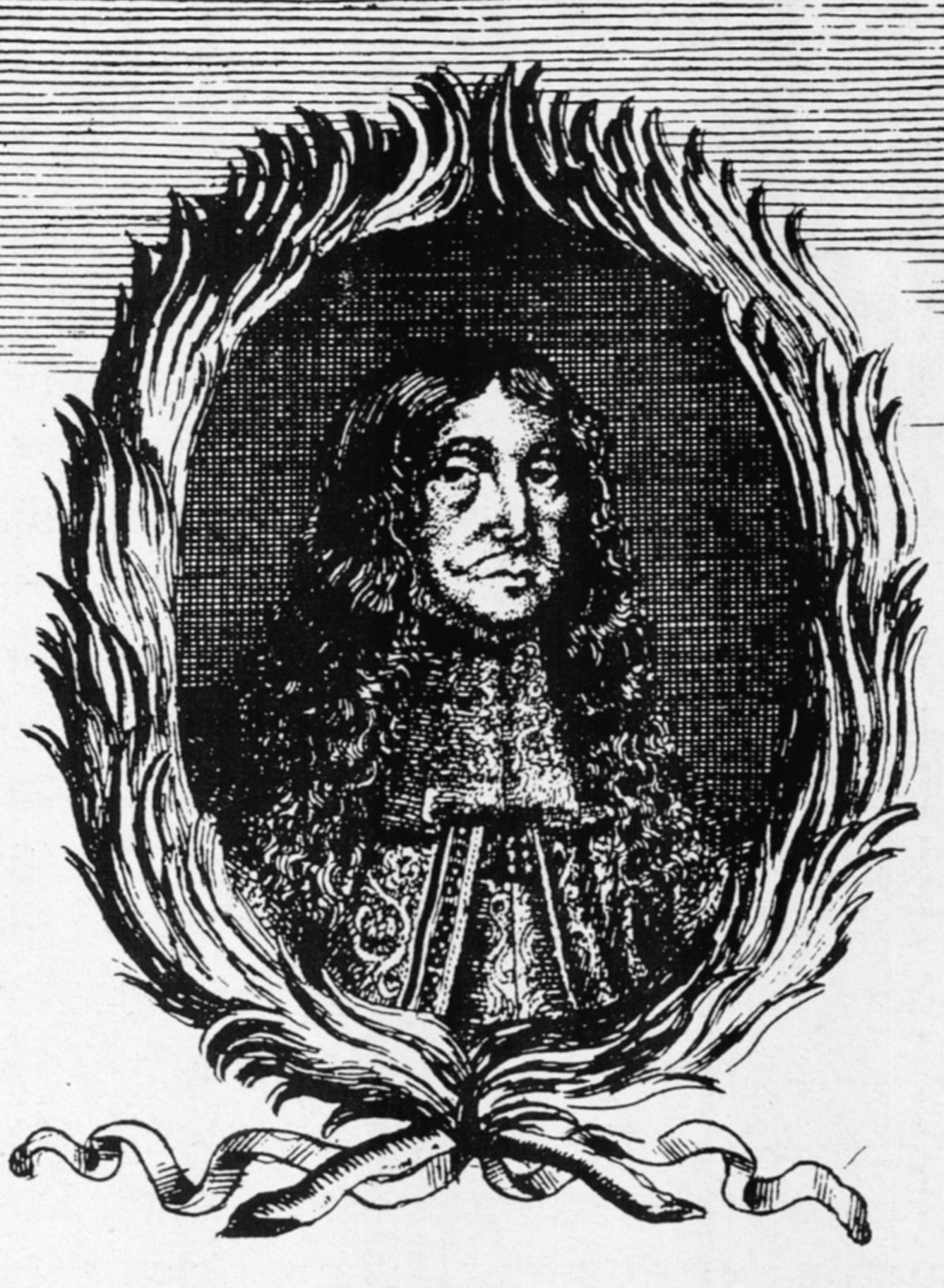 Andreas Paul(i) von Liliencon (* 4. Februar 1630 in Bredstedt; † 22. August 1700 in Hamburg) war ein deutscher-dänischer Geheimrat, Träger des Dannebrogordens und Landdrost (Landrat) der Herrschaft Pinneberg.